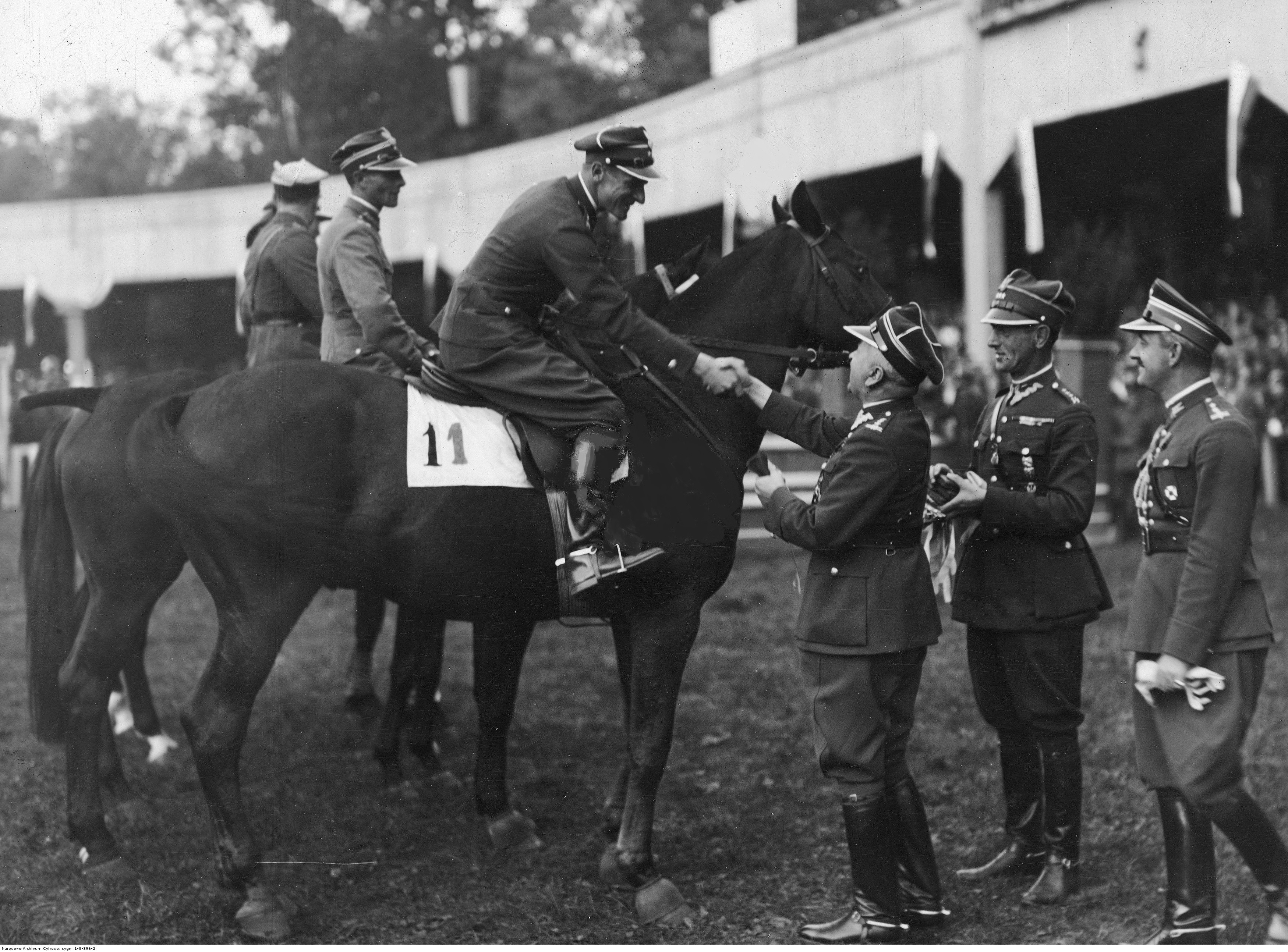 III Jeździeckie Mistrzostwa Polski na hipodromie w Łazienkach Królewskich w Warszawie. Pułkownik Zbigniew Brochwicz-Lewiński wręcza nagrodę mistrzowi Polski porucznikowi Romanowi Pohoreckiemu. Widoczni m.in.: wicemistrz Polski major Józef Trenkwald (siedzi na koniu obok R. Pohoreckiego), rotmistrz Leon Kon (2. z prawej) i pułkownik Jan Karcz (1. z prawej). Koncern Ilustrowany Kurier Codzienny - Archiwum Ilustracji. Sygnatura: 1-S-396-2